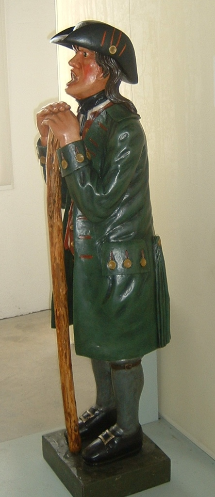 Spielfigur Maulaffe im Park Schönbusch Aschaffenburg. Bälle wurden zur Belustigung seitens des Publikums in den Mund geworfen. Sie kamen am Boden wieder heraus.